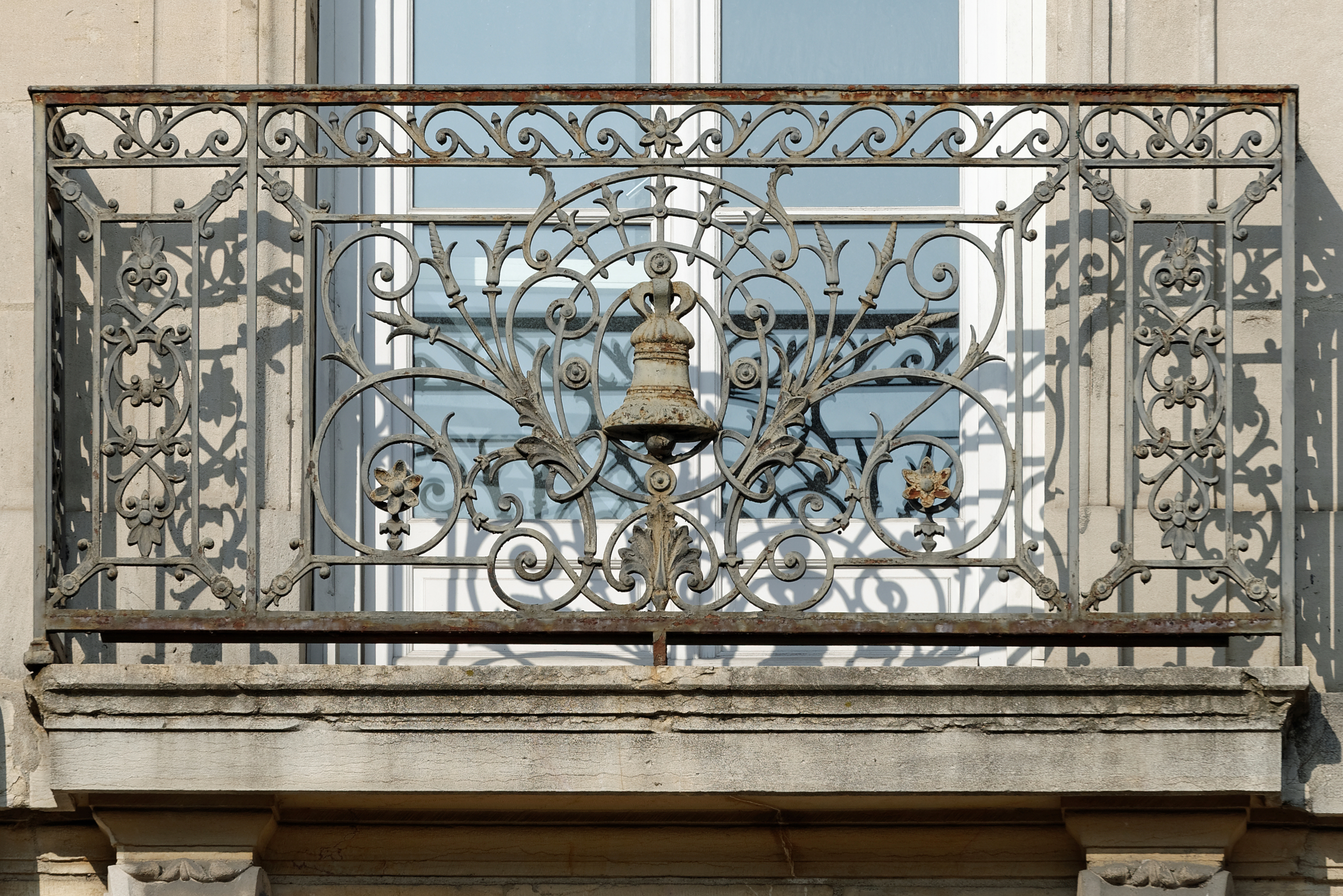 Détail d'un balcon de la façade du Grand hôtel la cloche, place Darcy à Dijon (France)